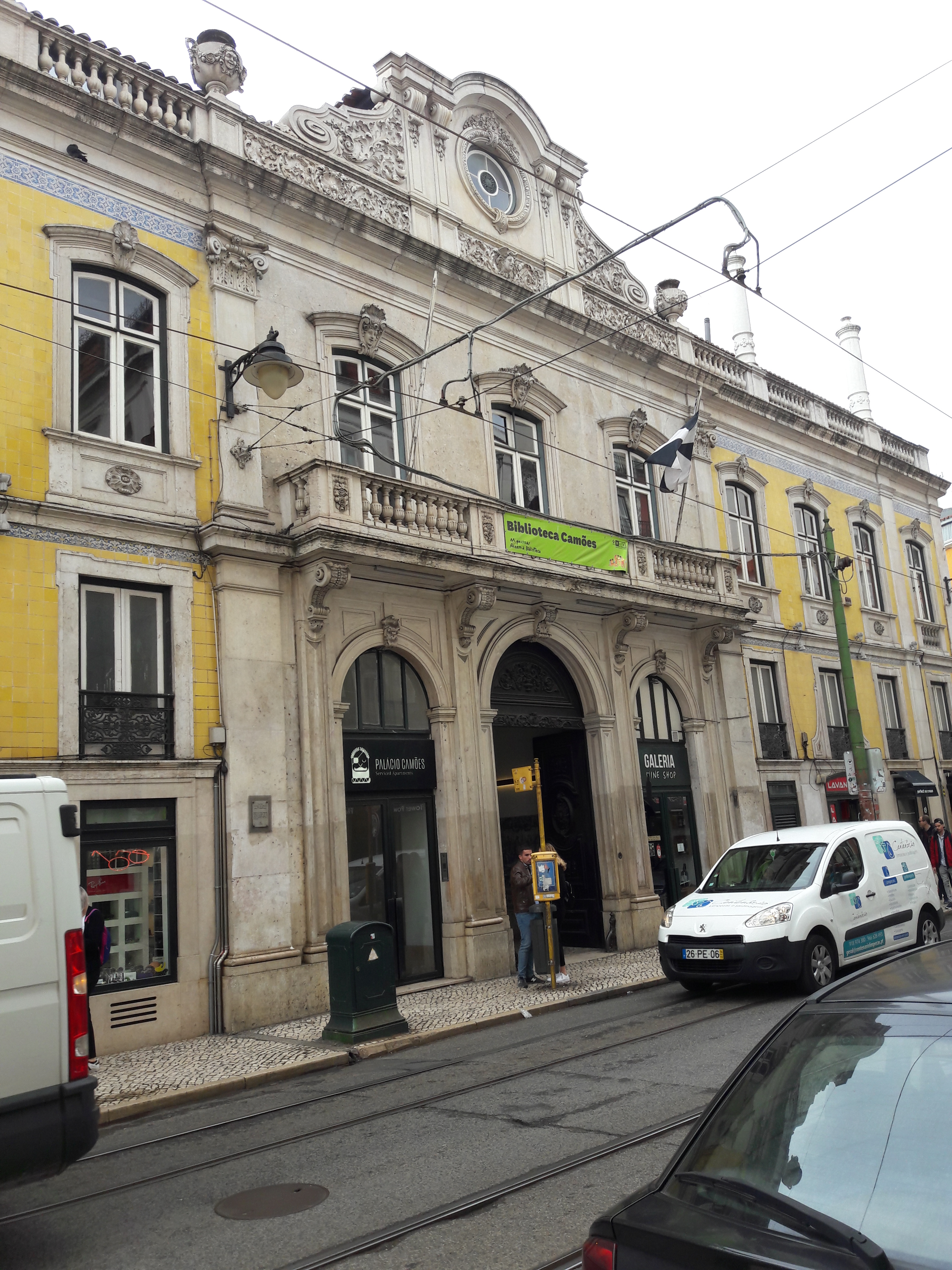 Biblioteca Camões, Chiado, Lisboa.